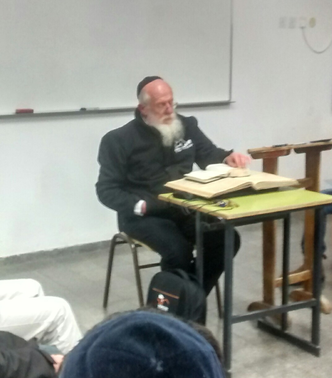 הרב יעקב מדן תשע"ז